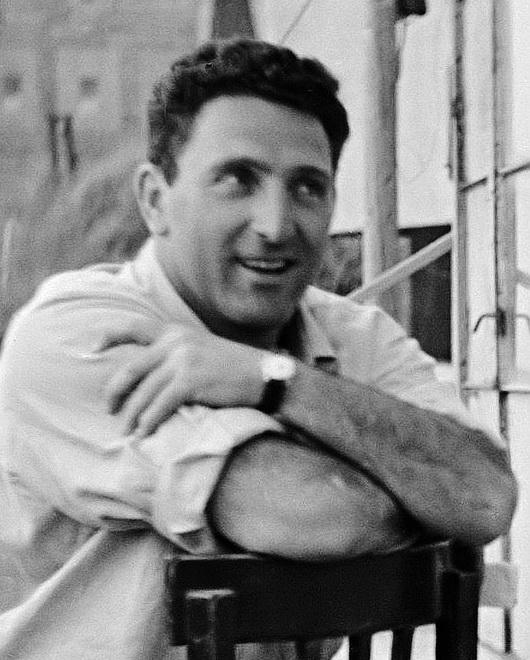 Irwin Shaw de befaamde romancier (links) bij zijn bezoek aan Israel in 1949 tezamen met de toneelschrijfster/journaliste Luisa Treves (G. Roselaar) en de acteur/regisseur Karl Guttman van het Teatron Kameri in Tel Aviv